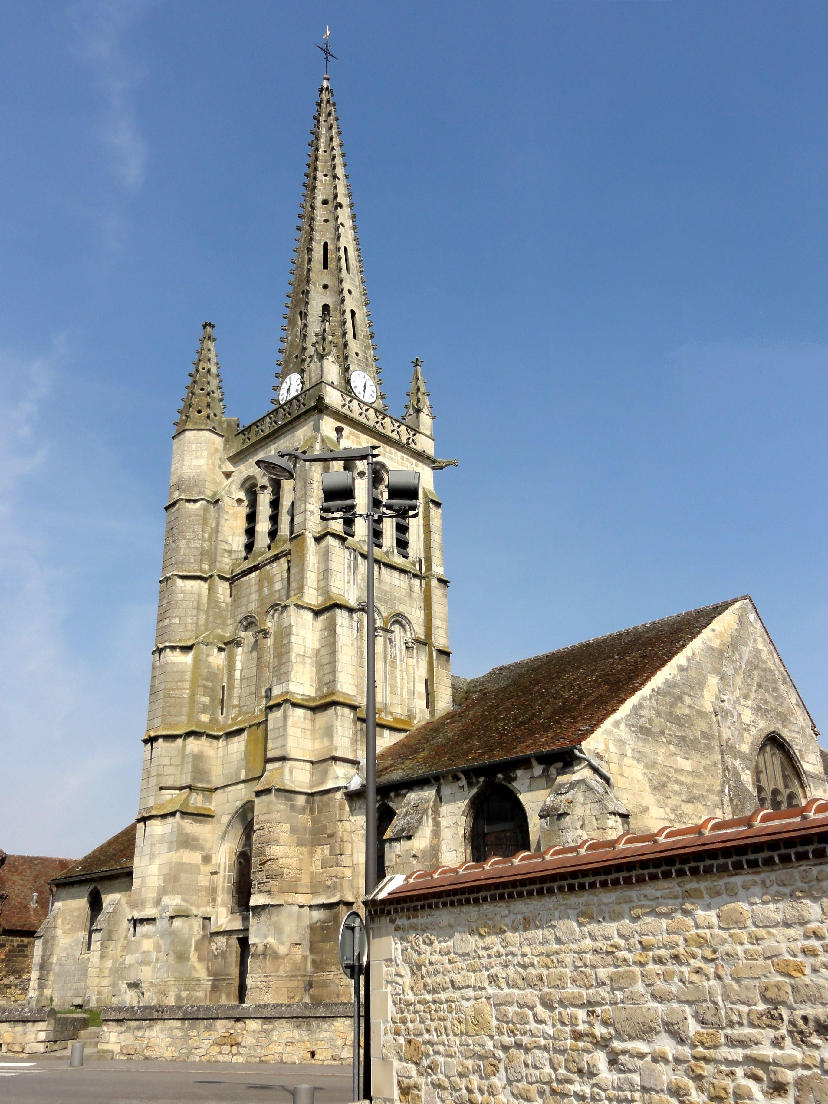 Vue depuis l'est.